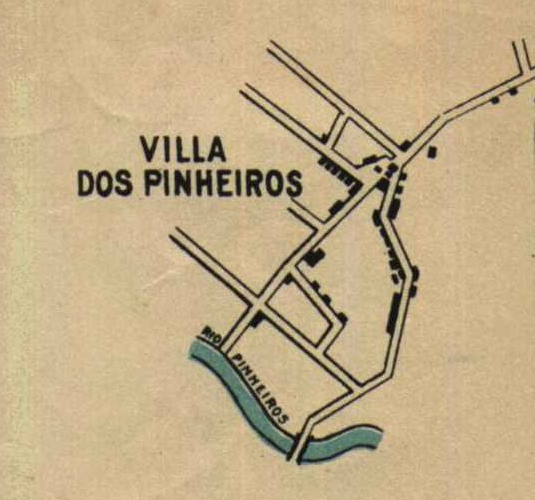 Pedro Augusto Gomes Cardim - Vila dos Pinheiros na Planta Geral da Capital de São Paulo (1897)